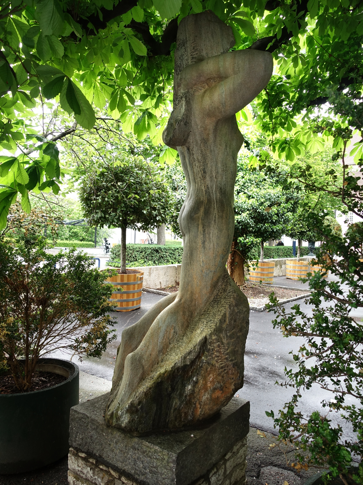 Jakob Probst 1942, Frau mit Maske. Seitenansicht. Die Skulptur steht im Restaurant Garten der Kunsthalle in Basel.